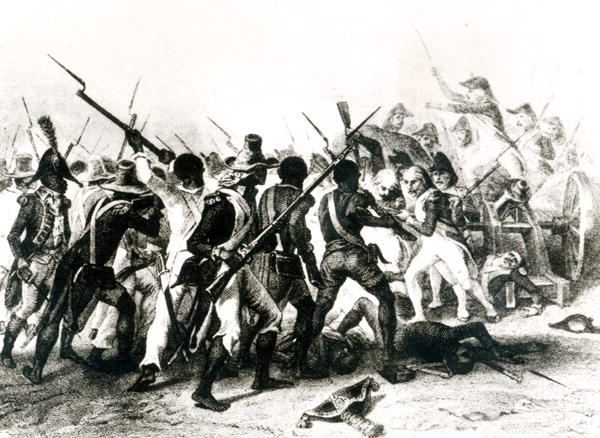 Représentation de la bataille de Vertières.